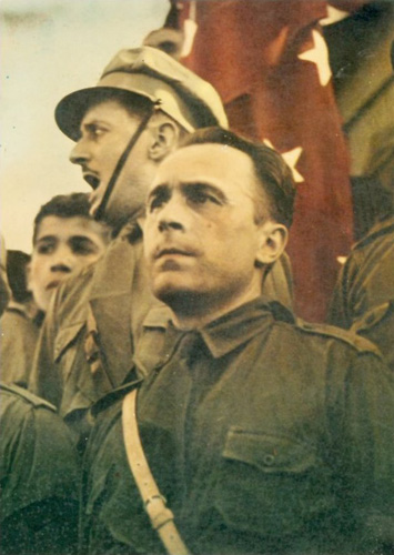 Jorge González von Marées (Santiago, 5 de abril de 1900 - Santiago, 14 de marzo de 1962), político chileno. Fundador y principal líder del Movimiento Nacional-Socialista de Chile, fue electo diputado entre 1937 y 1945.